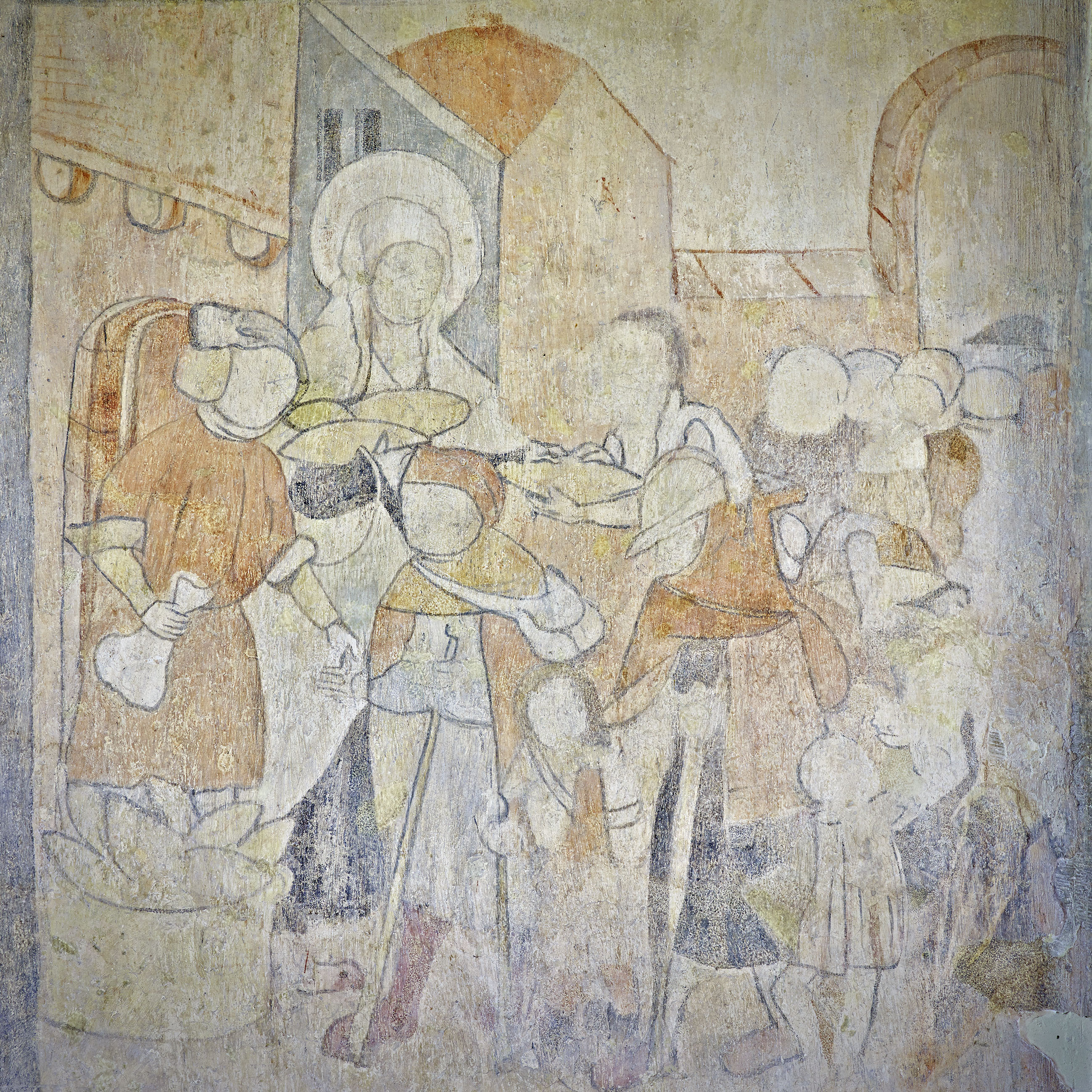 Wandmalerei über das Leben Elisabeths in der Liboriuskapelle zu Creuzburg.